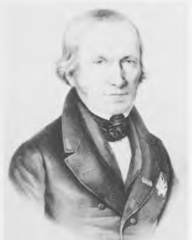 Portraitgemälde Christian Ludwig Runde, Oberappellationsgerichtspräsident in Oldenburg